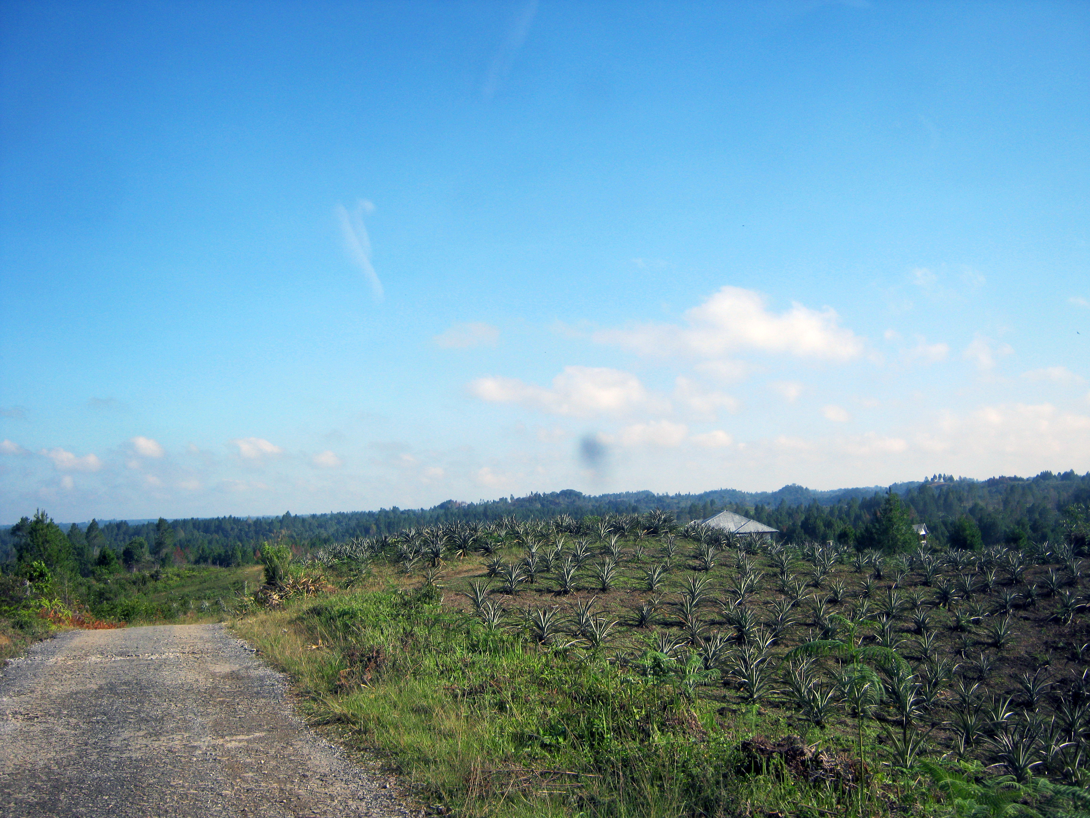 Negeri penghasil nenas